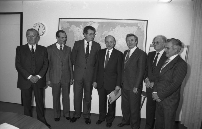 16. Dezember 1987 Staatssekretär Dr. Franz Kroppenstedt empfängt die Vorsitzenden der Landsmannschaften der Rumäniendeutschen: Dr. Wolfgang Bonfert (Siebenbürger Sachsen), Jacob Laub (Banater Schwaben) und Franz Einholz ( Sathmarer Schwaben) im Bundesministerium des Innern.